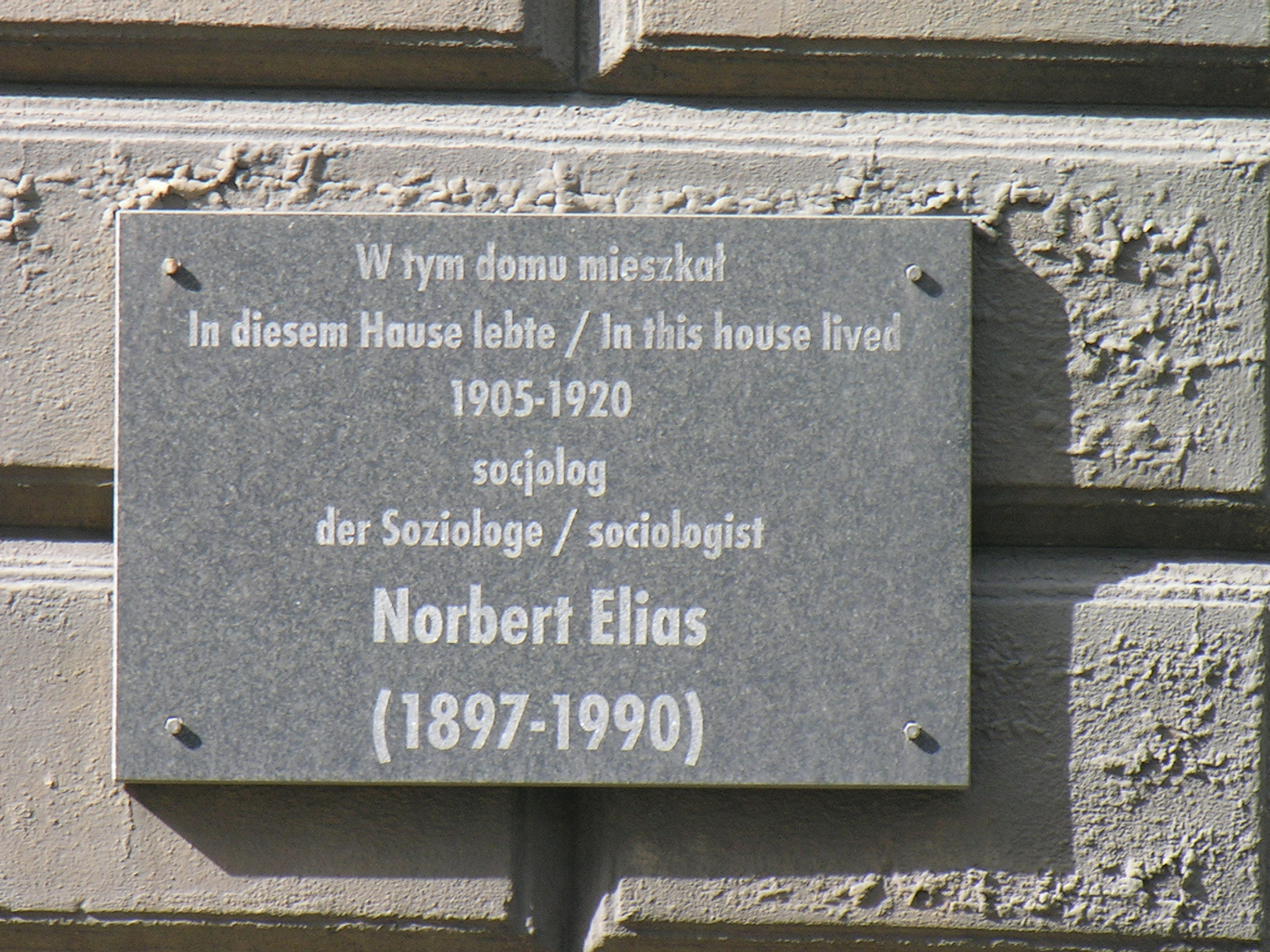 Tablica ku czci Norberta Elisa przy ul. Podwale 14 we Wrocławiu